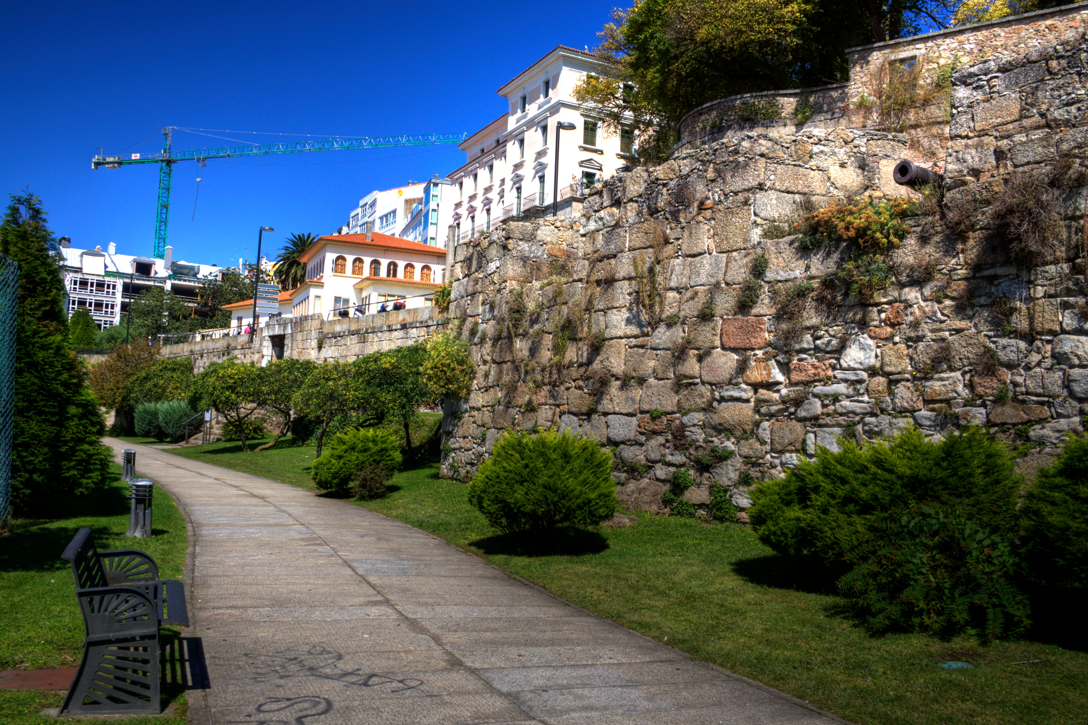 A Coruña, Murallas el Parrote